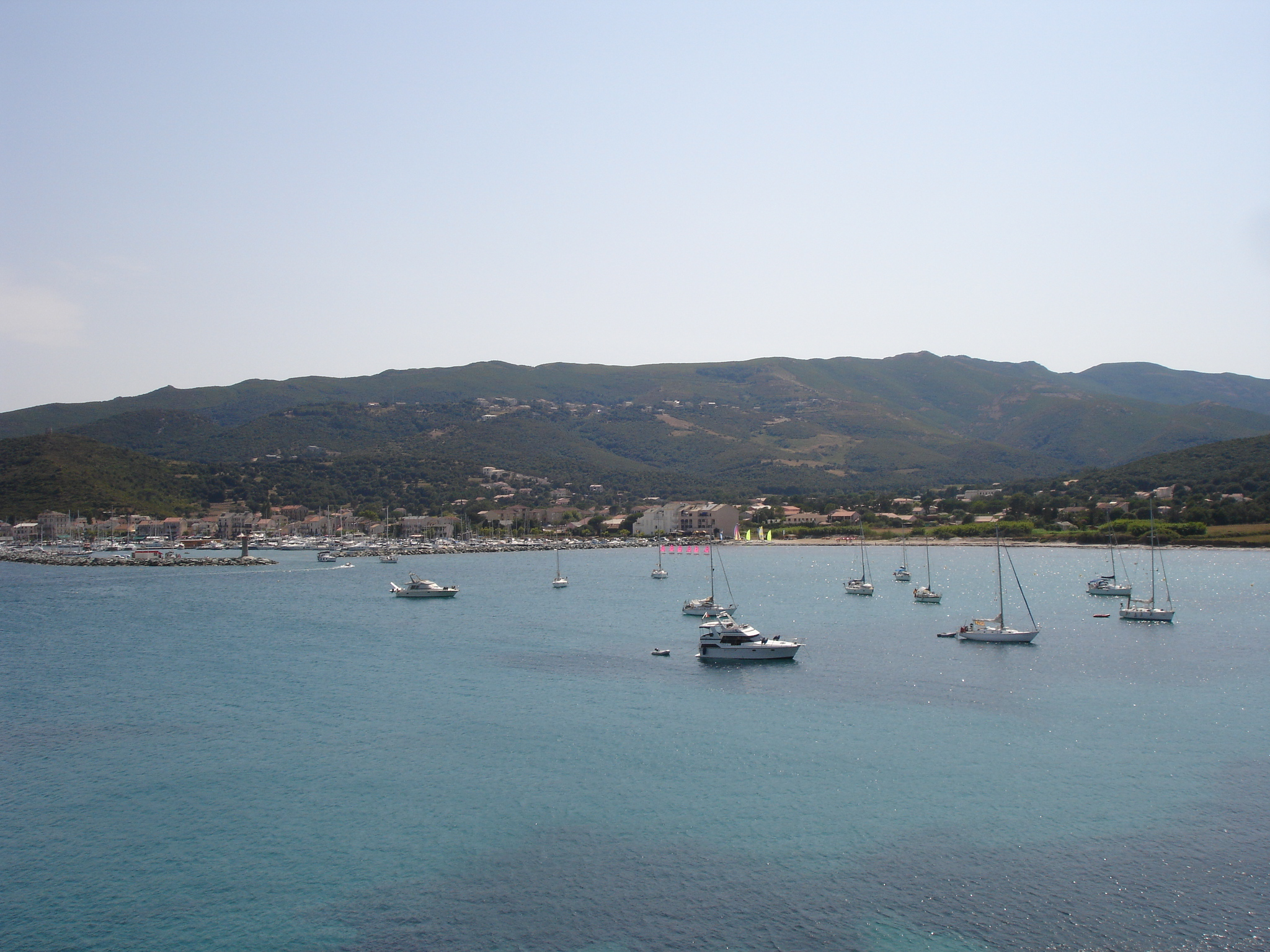 France, Haute-Corse (2B), Macinaggio, marine de Rogliano